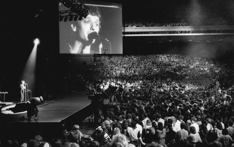 ADN-ZB Uhlemann-21.1.89 Berlin: "Tage der Jugend im Palast"- Ein Höhepunkt der Veranstaltungen am 10.1.89 war der Auftritt der BRD-Rockgruppe "Purple Schulz". "Isvai" heißt ihre aktuelle LP, die sie live bei den "Tagen der Jugend" im Großen Saal des Palastes präsentierten. Bekannt wurde die Gruppe durch Hits wie "Verliebte Jungs" oder "Sehnsucht". Während der einwöchigen Veranstaltungsreihe bot sich den jungen Besuchern ein vielfältiges Programm. Insgesamt mehr als 3 000 Mitwirkende sorgten unter dem Dach des Hauses am Marx-Engels-Platz für Unterhaltung und Entspannung."